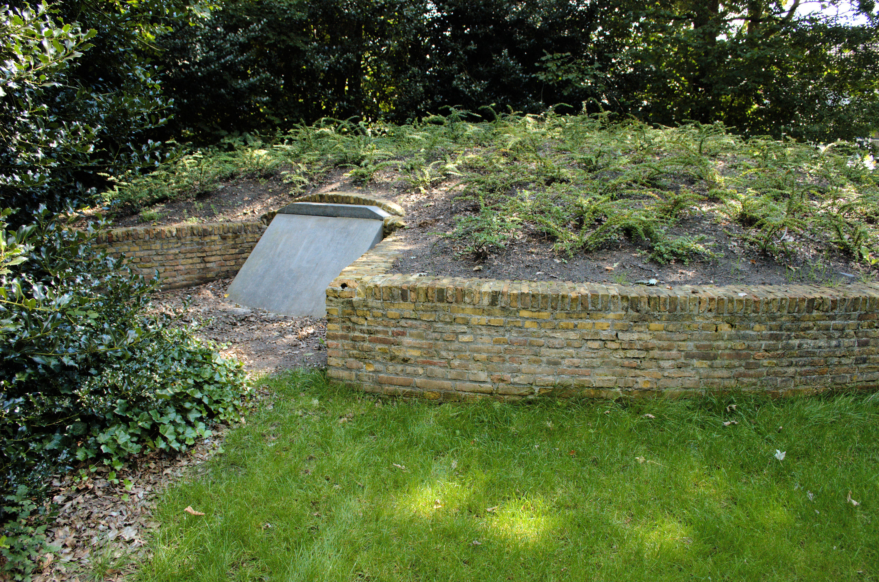 Grafkelder van de familie Ferf in Burgum